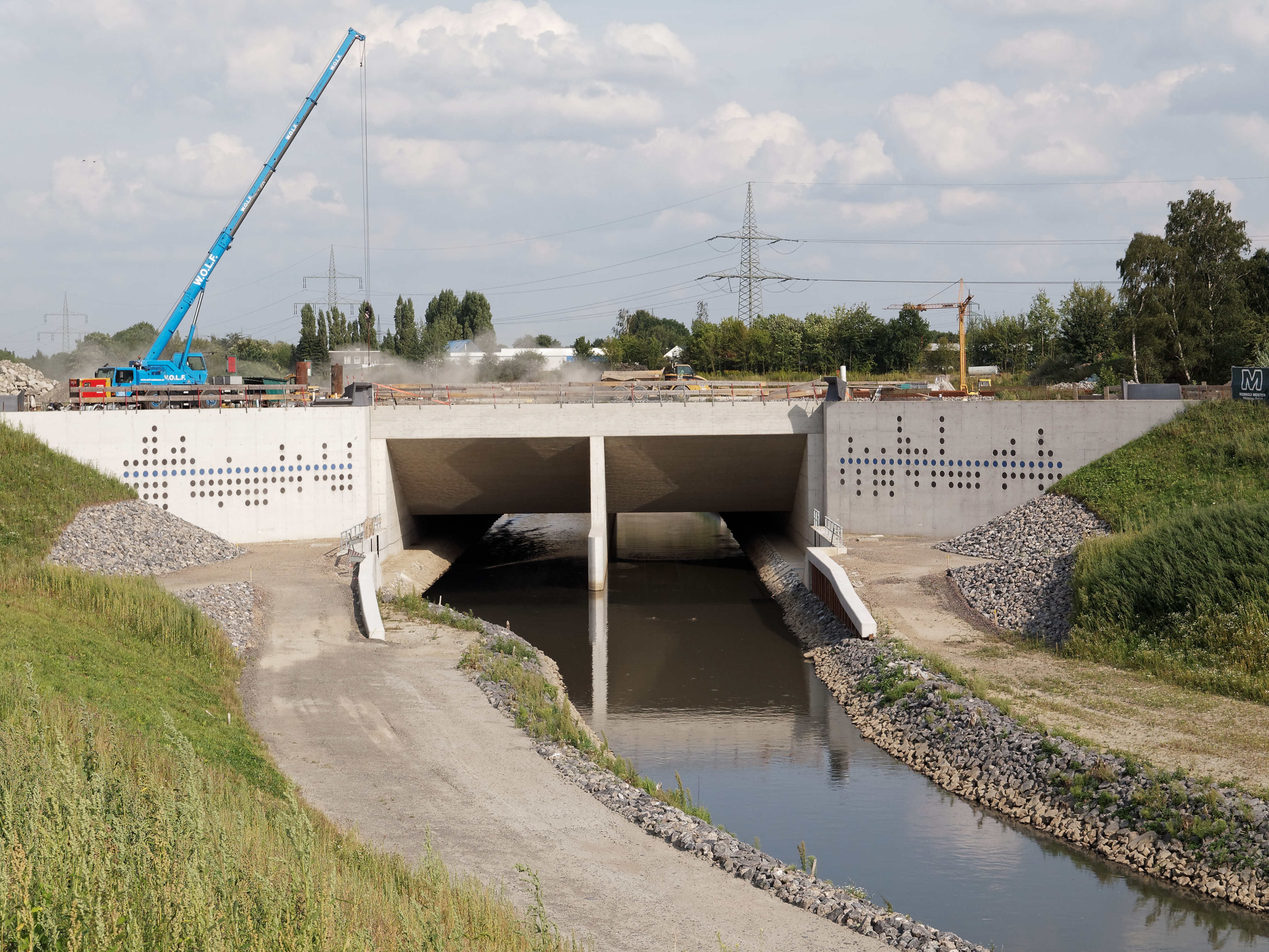 Der Emscherdurchlass unter dem Rhein-Herne-Kanal in Castrop Rauxel, kurz vor Gesamtfertigstellung